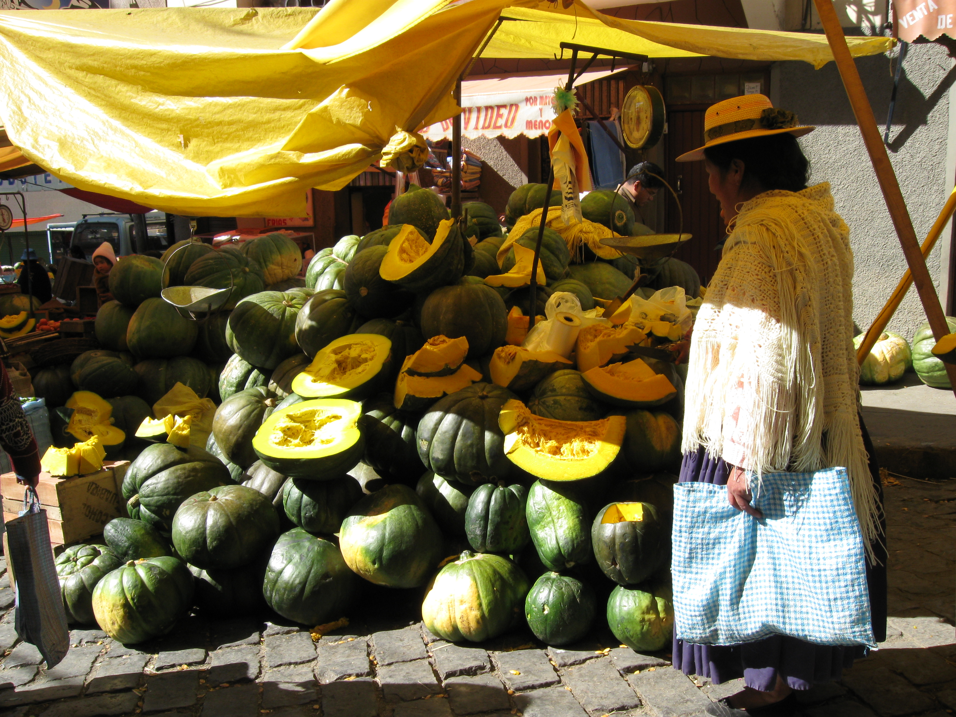 Original uploader: Esta foto fue tomada en el mercado Rodríguez (La Paz, Bolivia) mientras hacía las compras en el mercado. Me impresionó el tamaño de los zapallos.